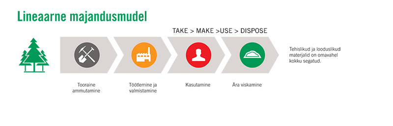 Valitseva lineaarse majandusmudeli raames võetakse loodusest ressursid, tehakse toode, kasutatakse, ja visatakse ära. vähesed tootjad mõtlevad disainimise algfaasis, kuidas ja mil määral saaks toodet pärast selle eluiga taaskasutada.